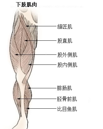 有人认为“股直肌”（rectus femoris）应为“股中间肌”（vastus intermedius）。此处暂且采用“股直肌”。